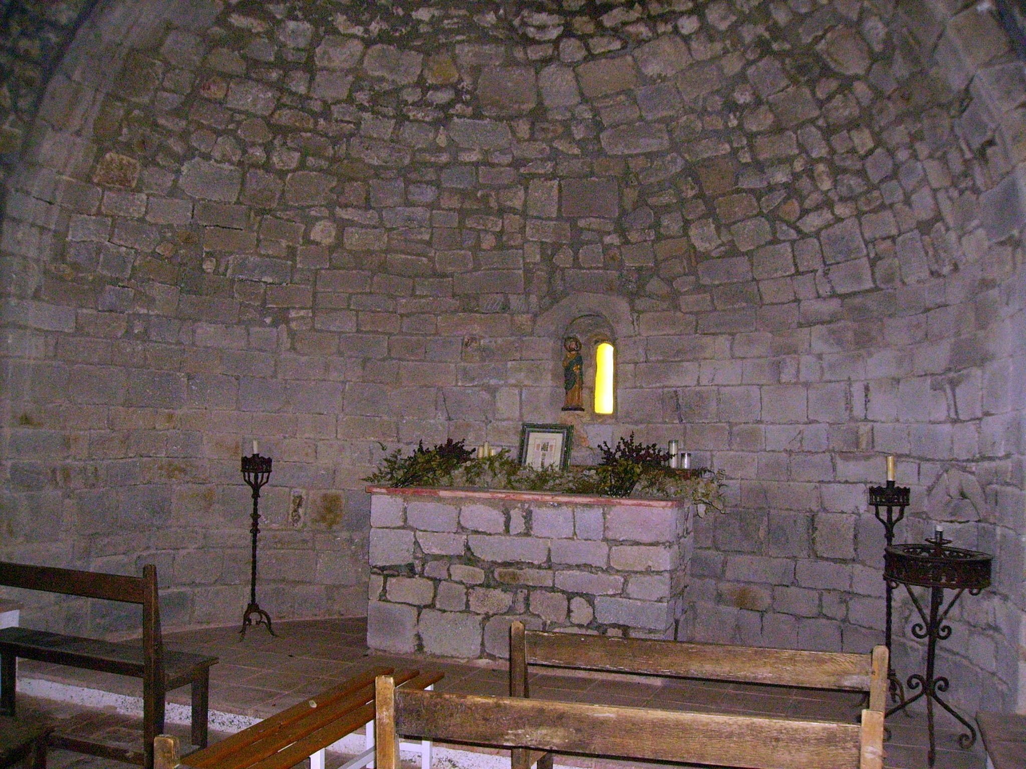 Ermita de Sant Mateu (Premià de Dalt)